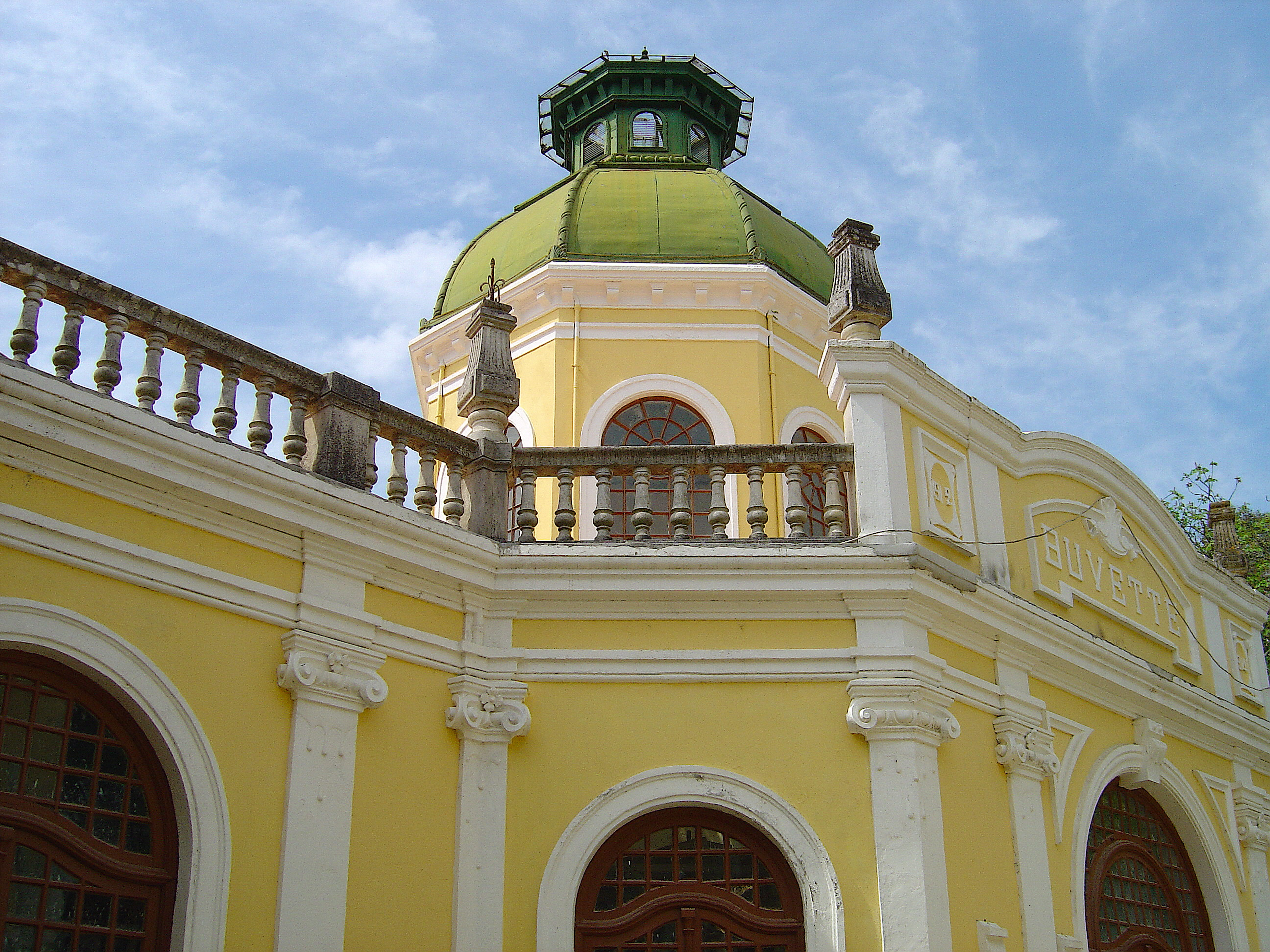 Buvete das termas da Curia - Anadia Fotografia de Vitor Oliveira, integrada na colecção com o endereço